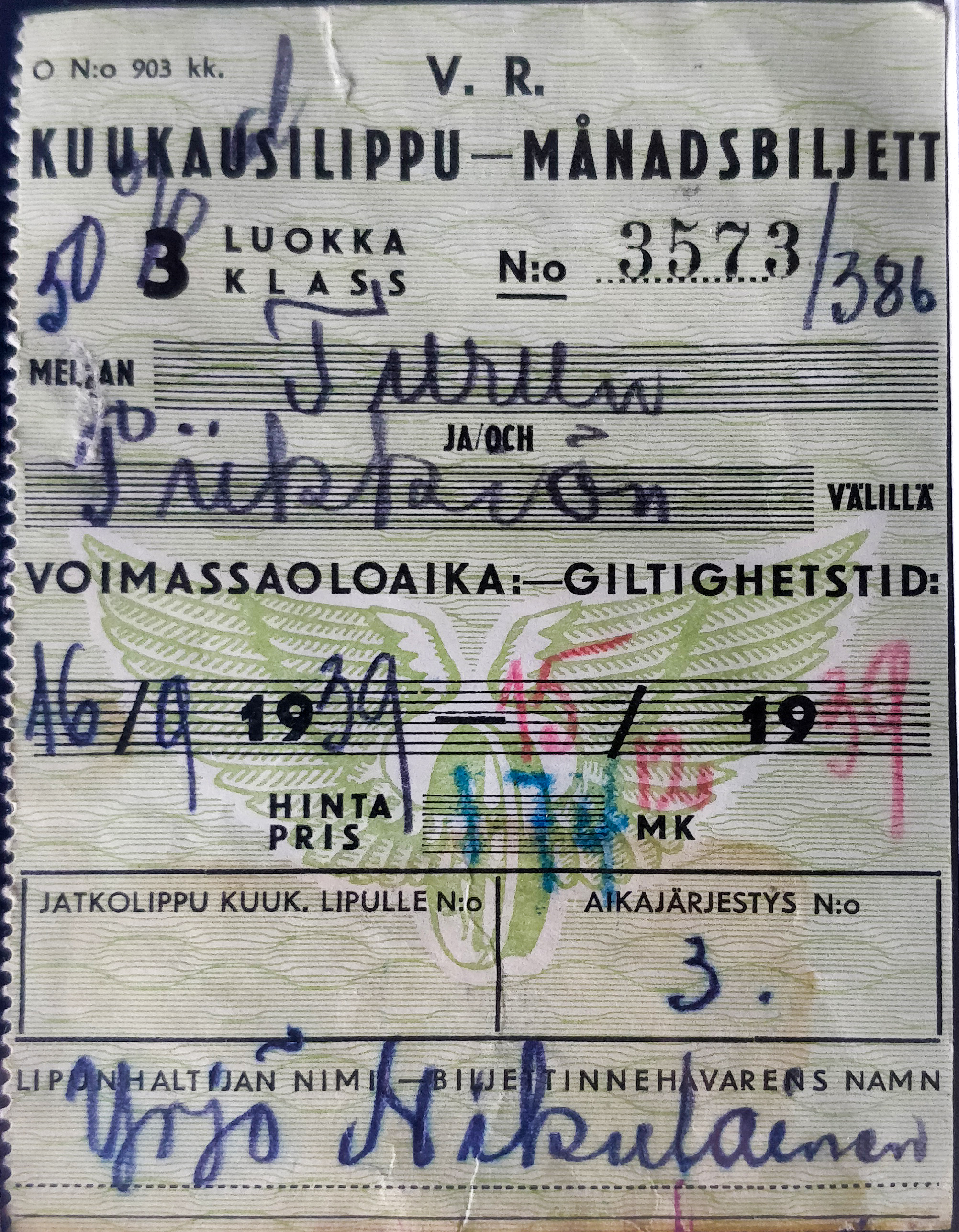 Kuukausilippu Turusta Piikkiöön. Linpunhaltija Yrjö Nikulainen, Piikkiön rautatieaseman sähköttäjä vuosina 1916-1920